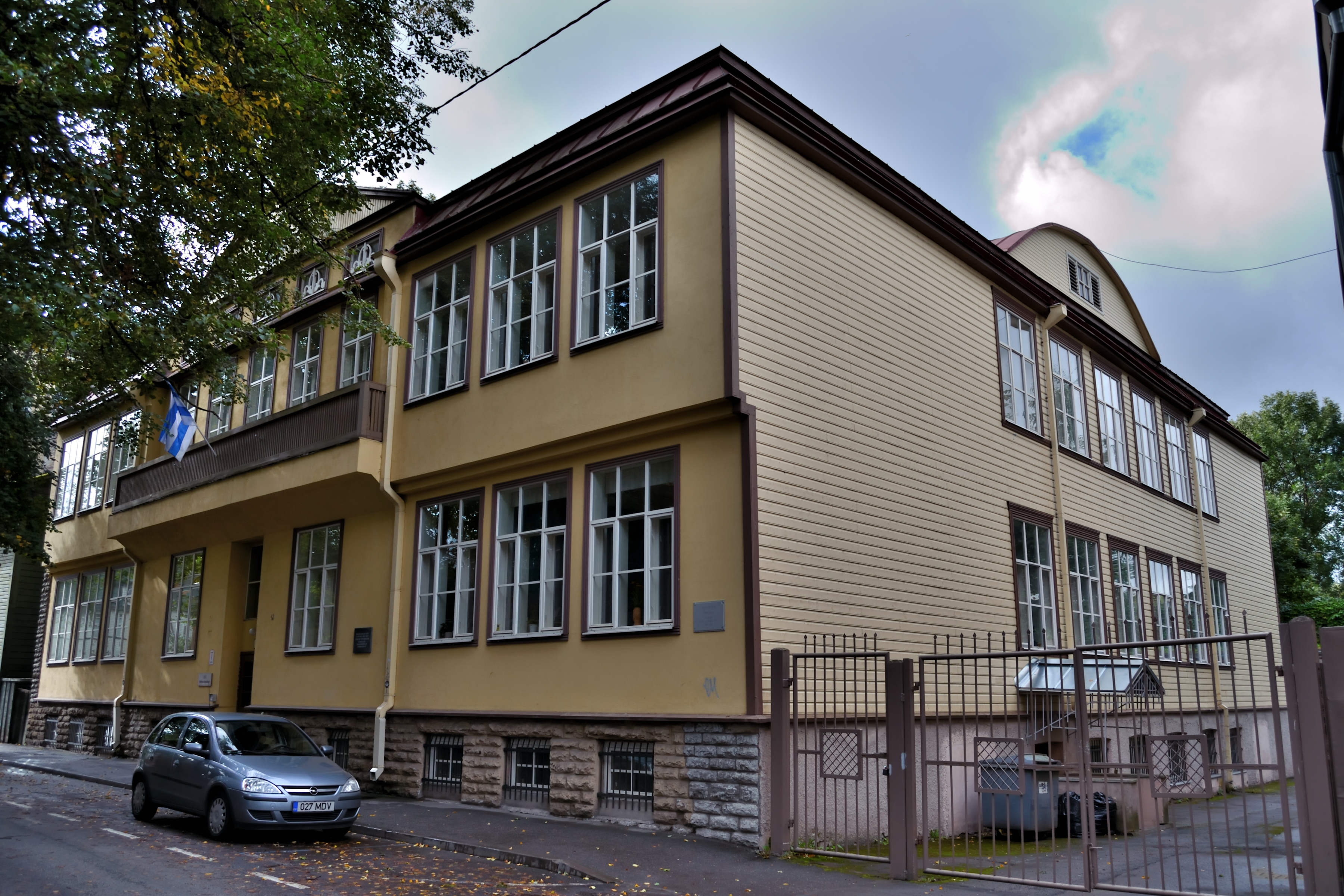 Jakob Westholmi poeglaste erahumanitaar-gümnaasiumi hoone, II maja, 1913